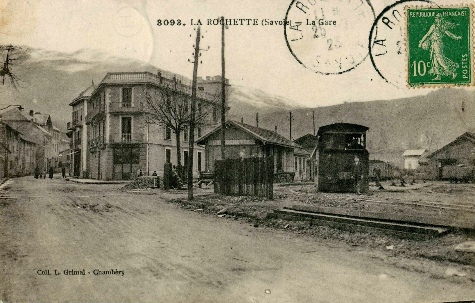 Carte postale ancienne éditée par Grimal à Chambéry, n°3093 :LA ROCHETTE - La gare